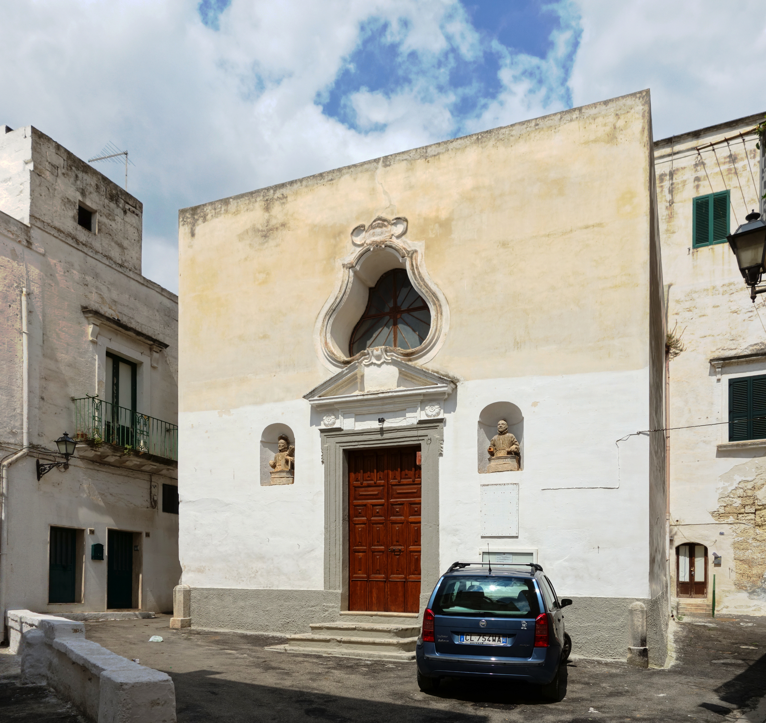 La chapelle Madonna del Lume à Grottaglie, Italie.